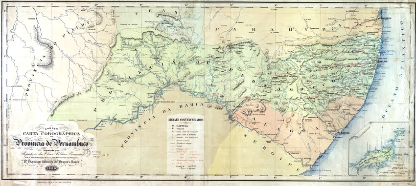 Carta Corographica da Provincia de Pernambuco - 1880.